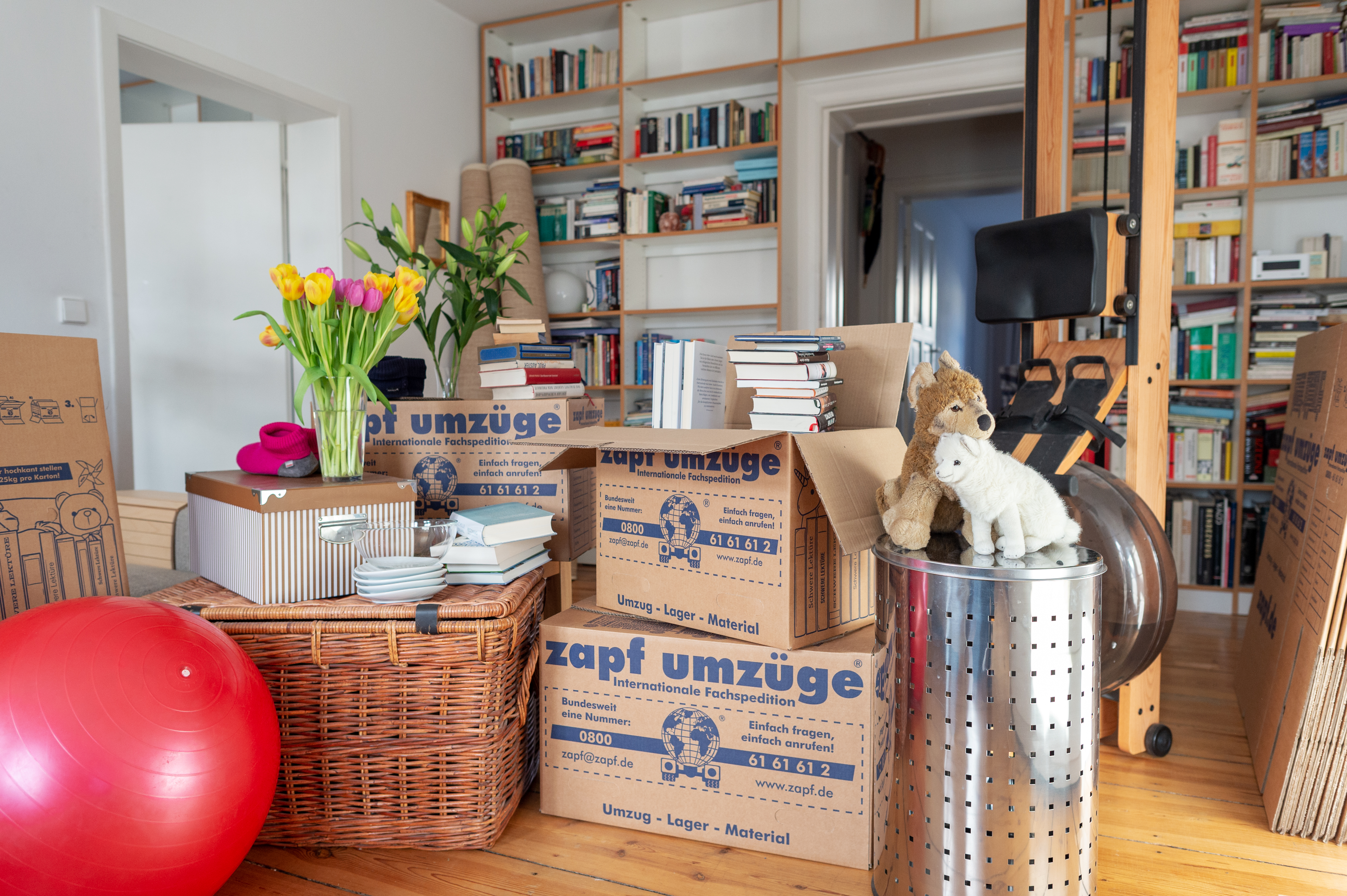 zapf umzüge AG, 1975 gegründete internationale Umzugsfachspedition mit Sitz in Berlin und Filialen in sieben weiteren Städten. Eine Kundenwohnung vor dem Umzug.